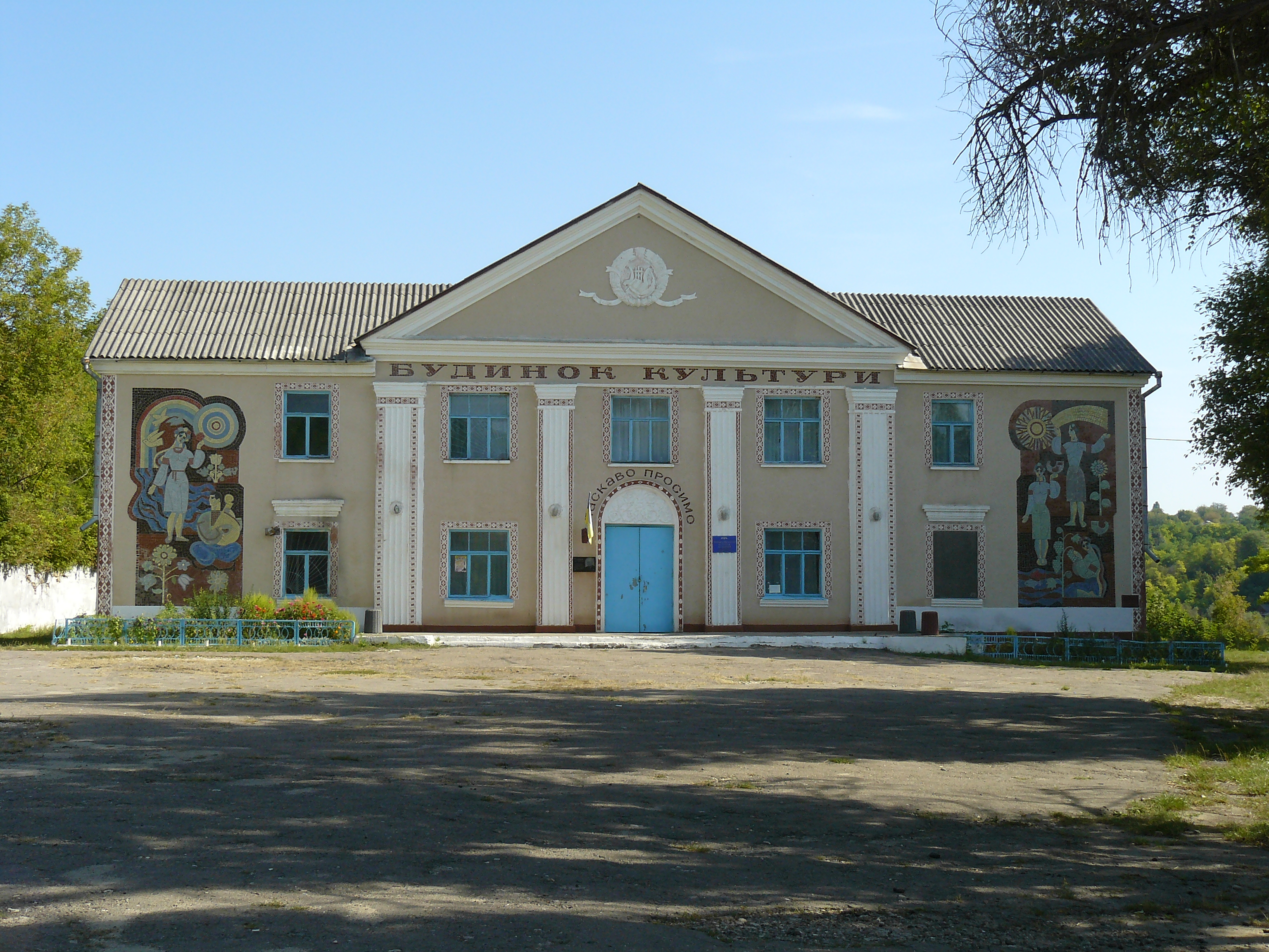 с. Трибусівка